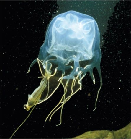 Chirodropus é um género de águas-vivas em forma de cubo (Cubozoa) da família Chirodropidae.